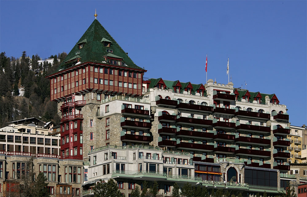 Badrutt’s Palace Hotel in St. Moritz